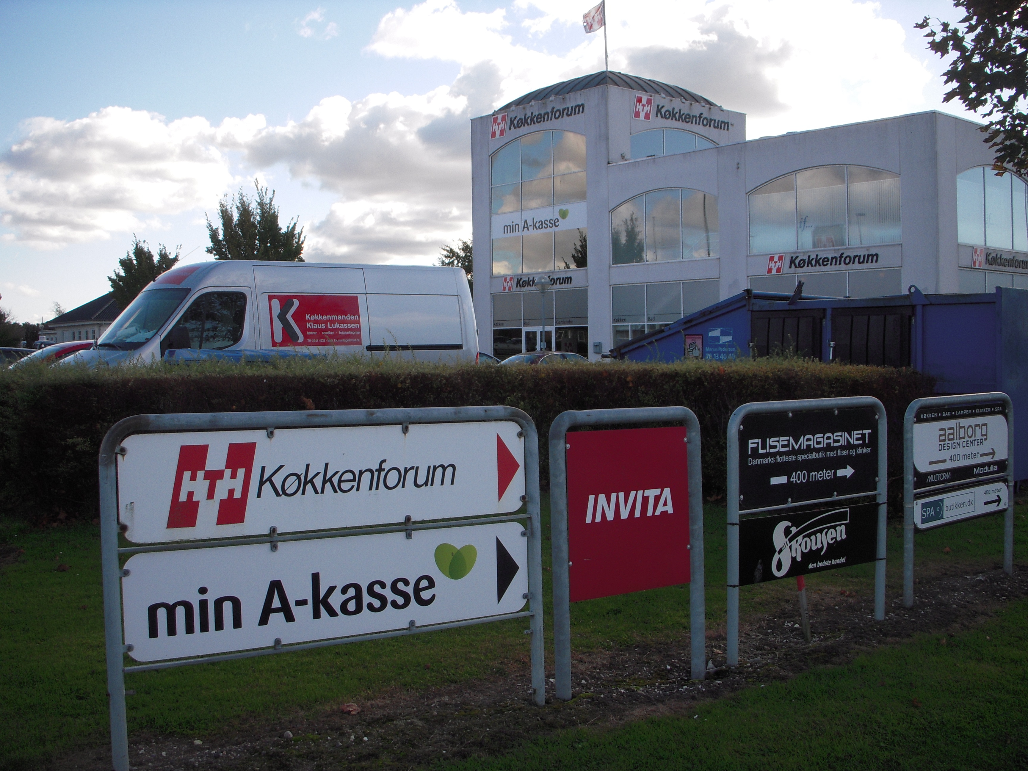 Min A-kasse's afdelingskontor i Aalborg ligger i samme bygning som bl.a. en HTH køkkenforretning.